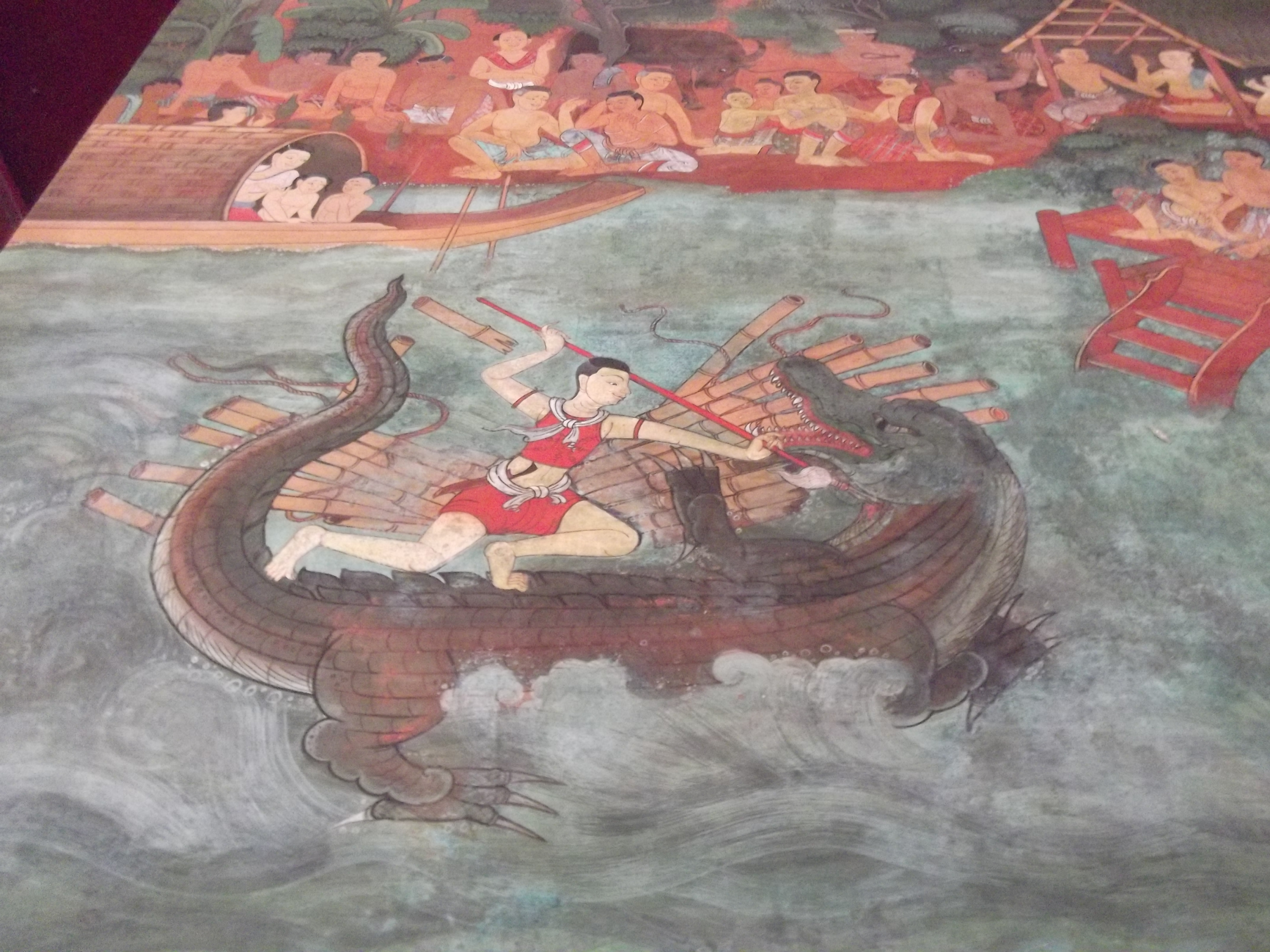 วัดอัมพวันเจติยาราม